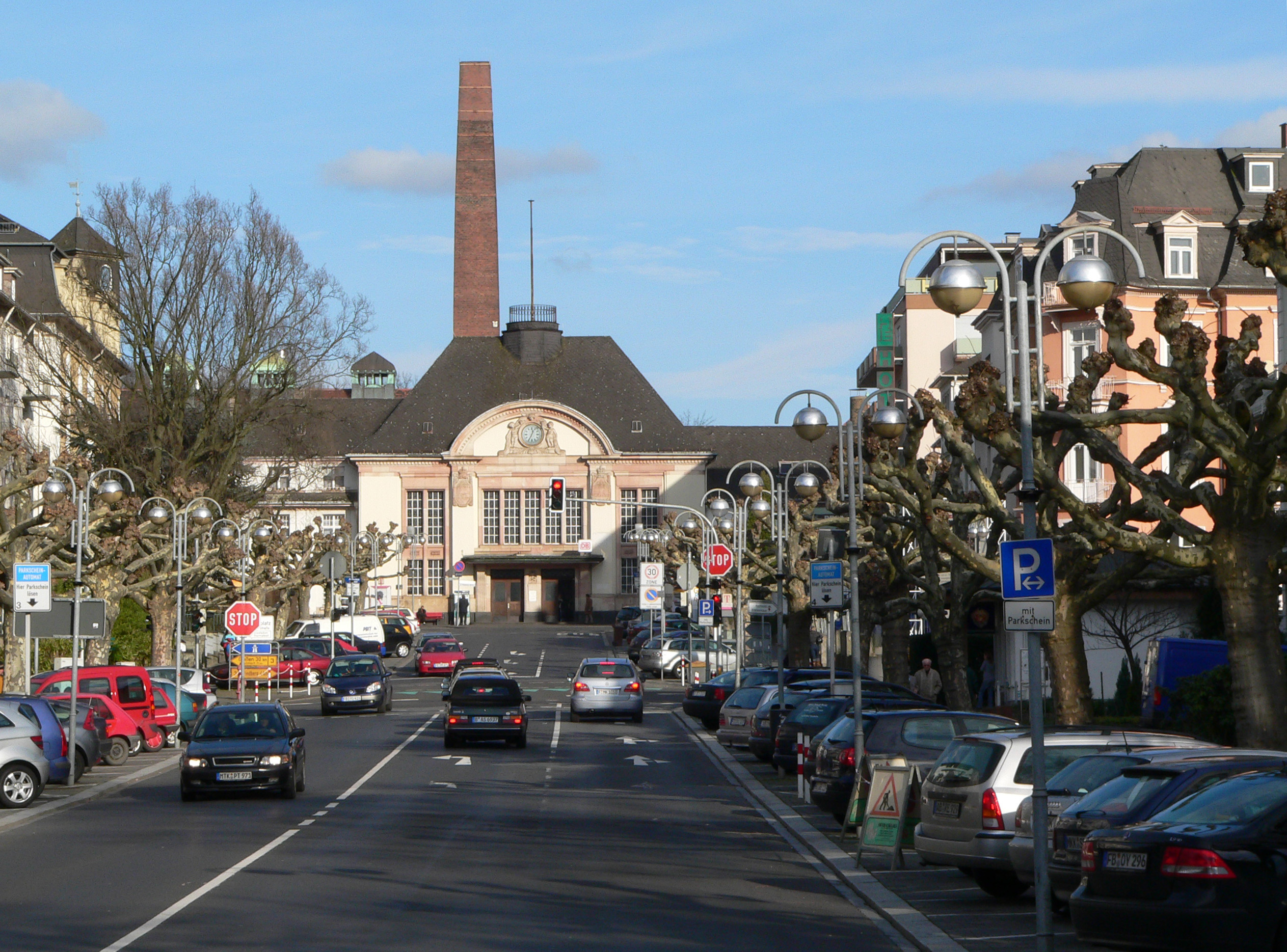 Bahnhofsallee in Bad Nauheim